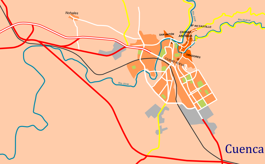 Plano de accesos a Cuenca.